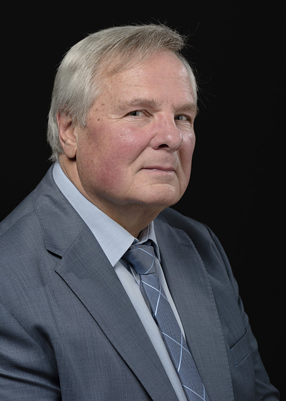 Marc Dubugnon, organiste, né à Aubonne le 24 mai 1946. Portrait réalisé à la BCU Lausanne, le 24 septembre 2015.